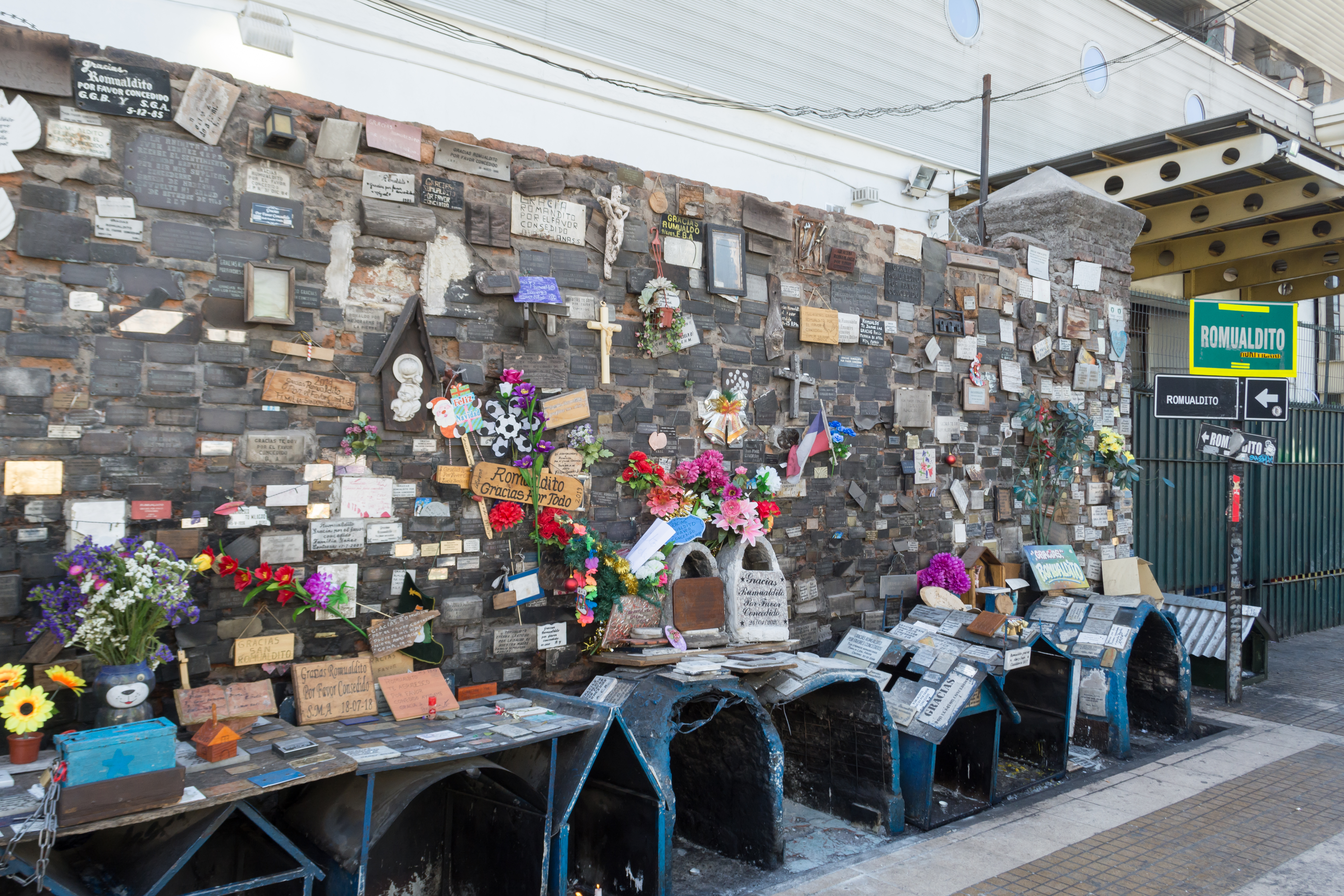 Animita de Romualdito, Estación Central, Santiago, Región Metropolitana, Chile